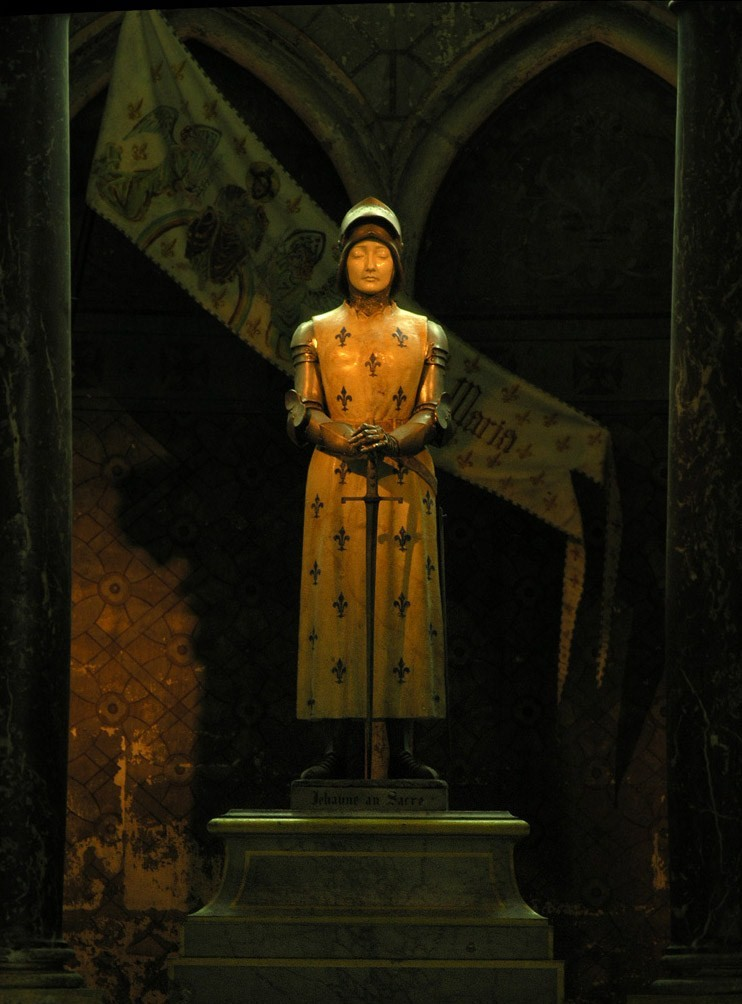 Statue polychrome en pied de Jeanne d'Arc. L'armure est revêtue d'un surcot fleurdelysé ; à l'arrière-plan flotte une reproduction en soie de la bannière de la Pucelle qui fut offerte par des anglais en 1938.